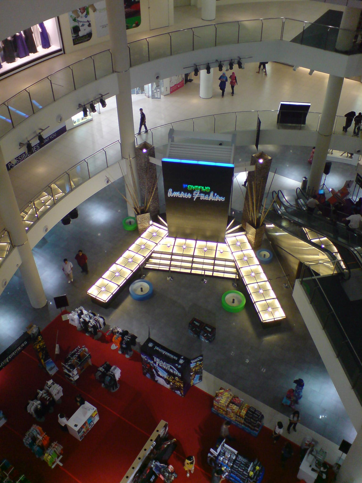 1st Avenue Komtar